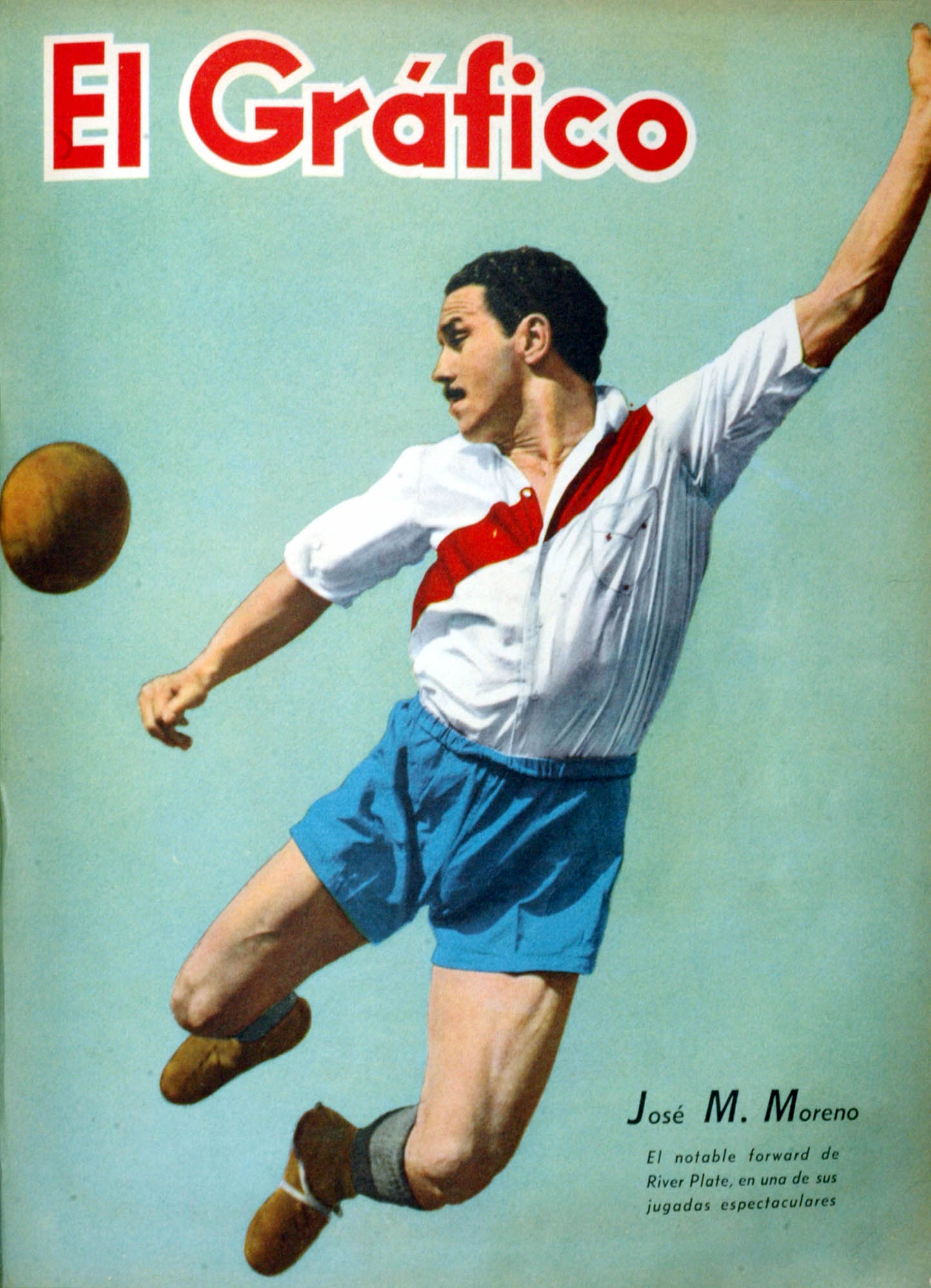 El Grafico del 17 de Octubre de 1941. Edicion 1162